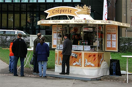 Basler Herbstmesse 2005: Crêperie (Rosentalanlage)